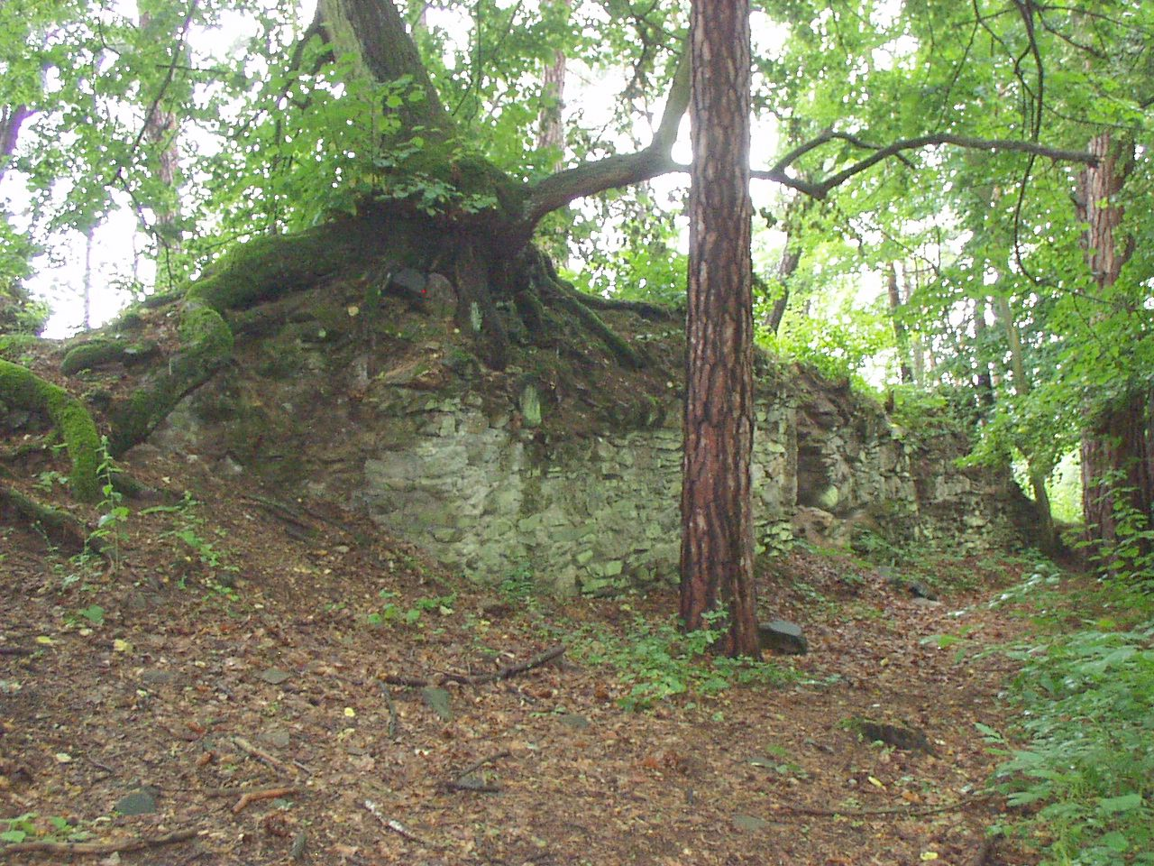 zřícenina hradu Křikava, zbytky budovy na severozápadním nároží